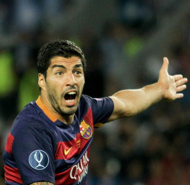 Луис Суарес в матче за Суперкубок УЕФА в августе 2015 года в Тбилиси.